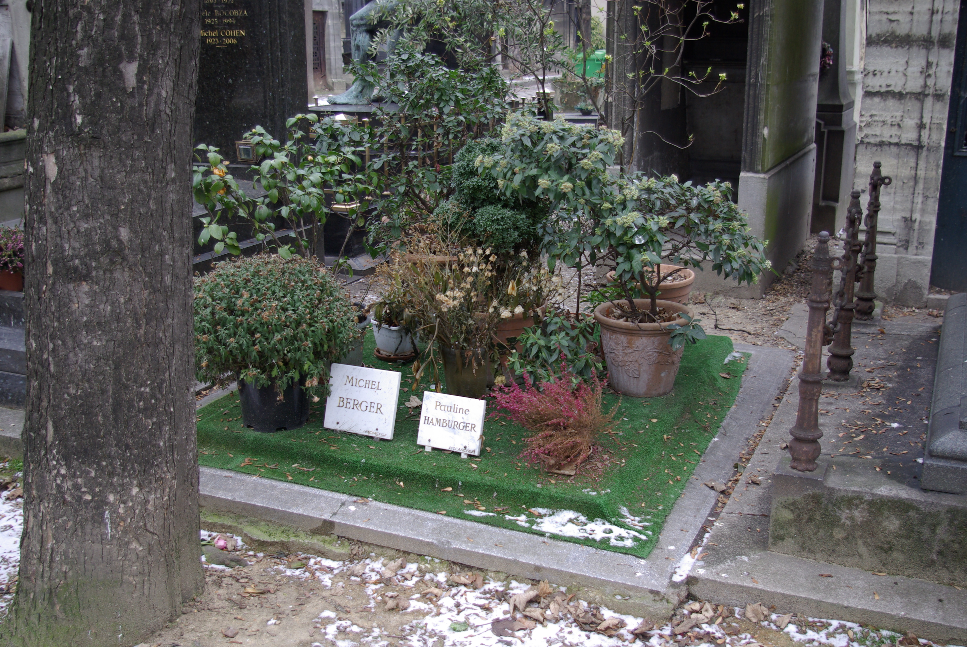 Grab von Michel Berger auf dem Friedhof Cimetière de Montmartre in Paris